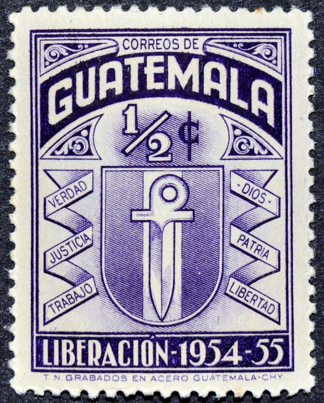 Selo da Guatemala, de 1/2c., comemorativo da Revolução de 1954-55.